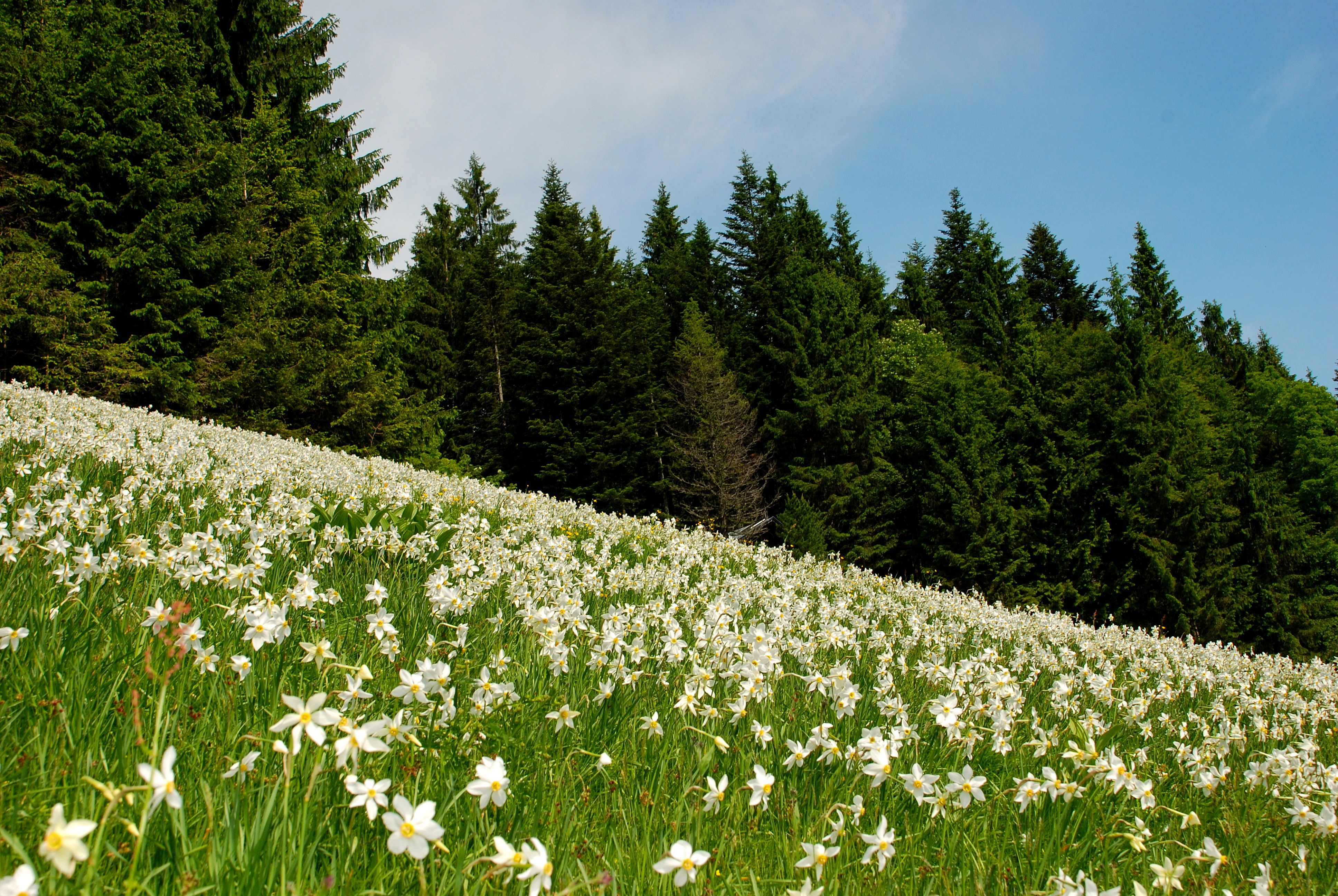 naturbelassene Narzissenwiesen im Ausseerland